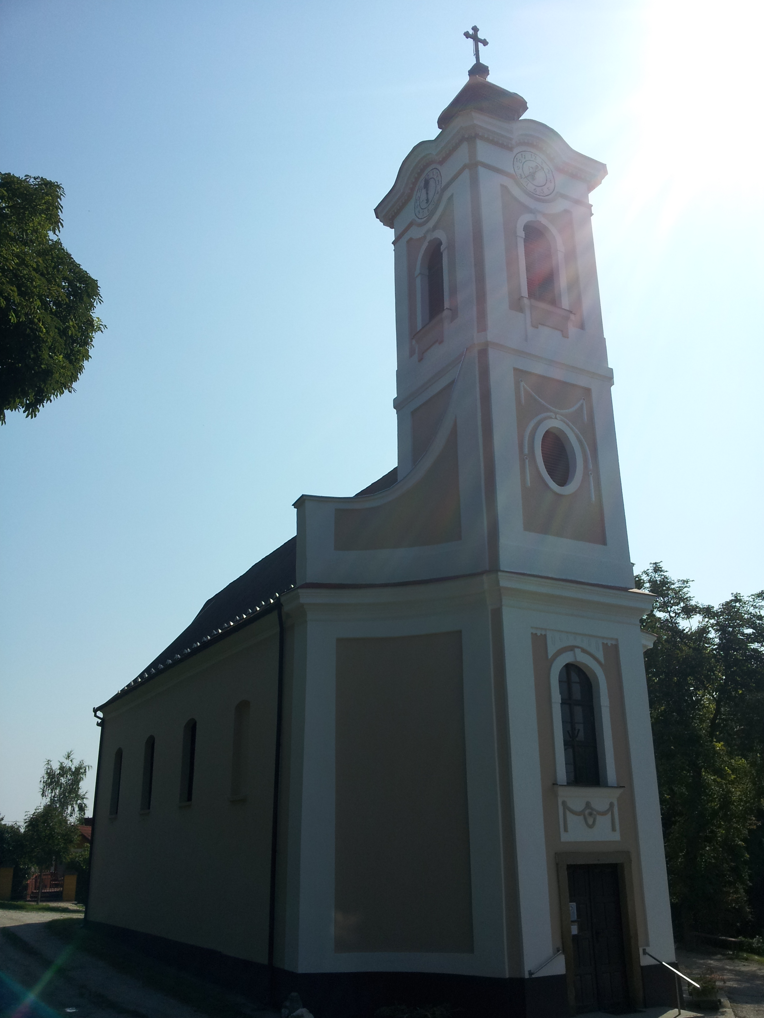 Villány römisch-katholische Kirche